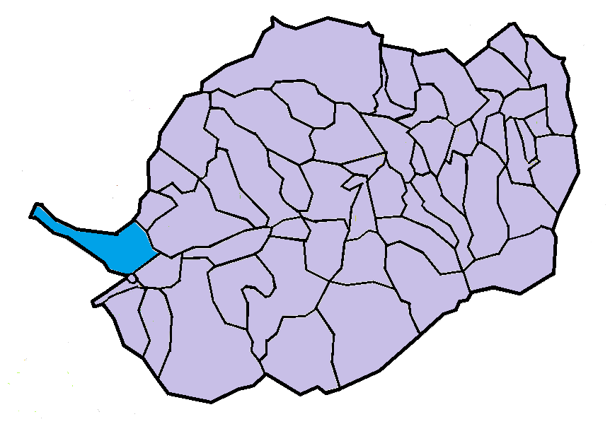 La Llaguna en el Conflent, a partir del mapa municipal del Conflent de lliure disposició adaptat al Nomenclàtor toponímic aprovat el 2007